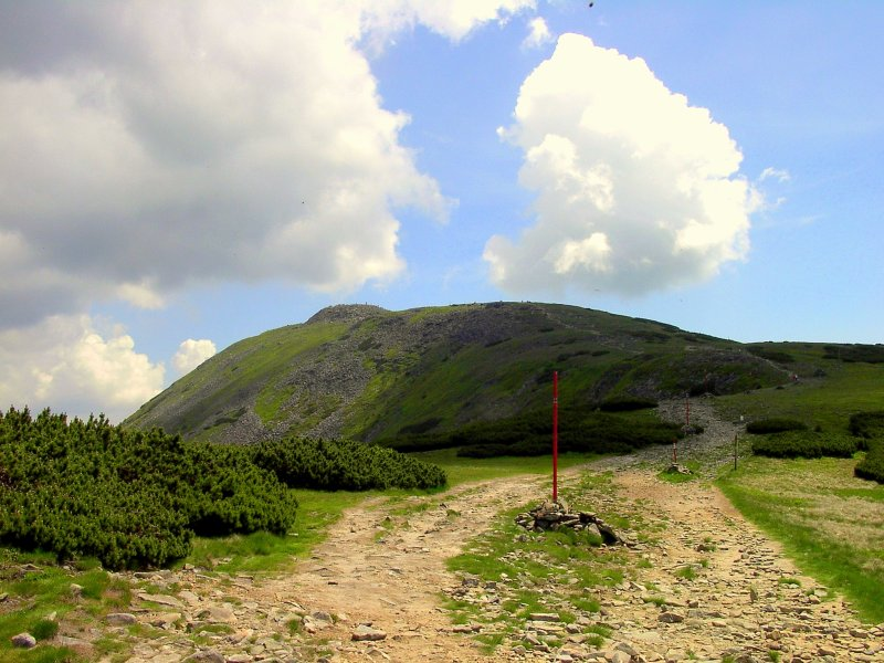 Babia Góra - widok z Małej Babiej